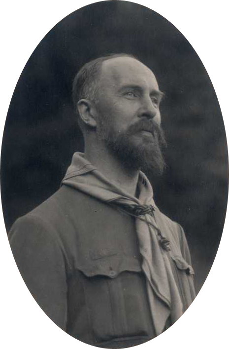 Carte postale de 1929 représentant le père Jacques Sevin (1882-1951).